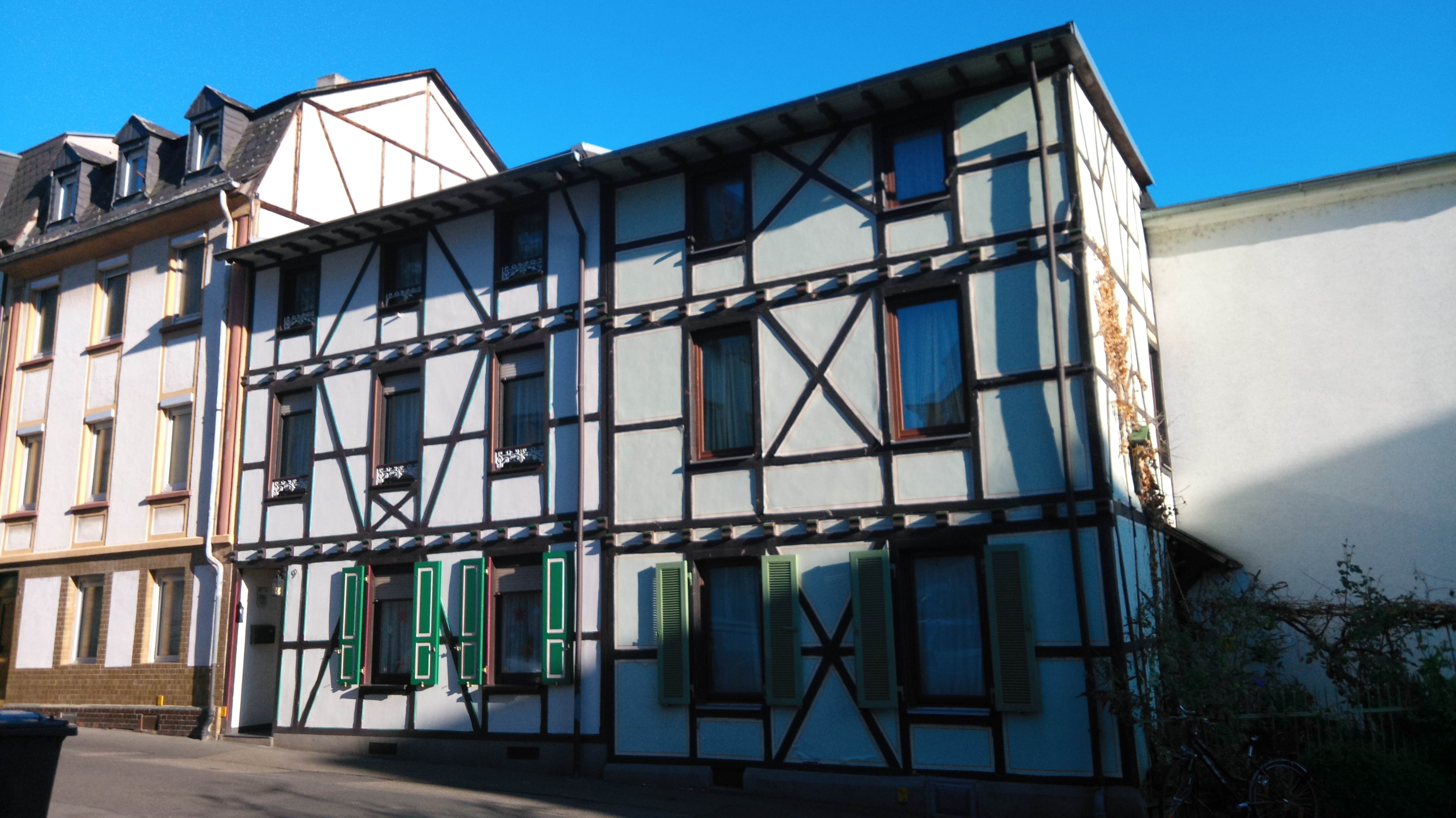 Elisenstraße 9 & Antoniusstraße 16 in Koblenz-Lützel Sie sind Teil der Denkmalzone Elisenstraße 1-9 (ungerade Nummern), Antoniusstraße 16